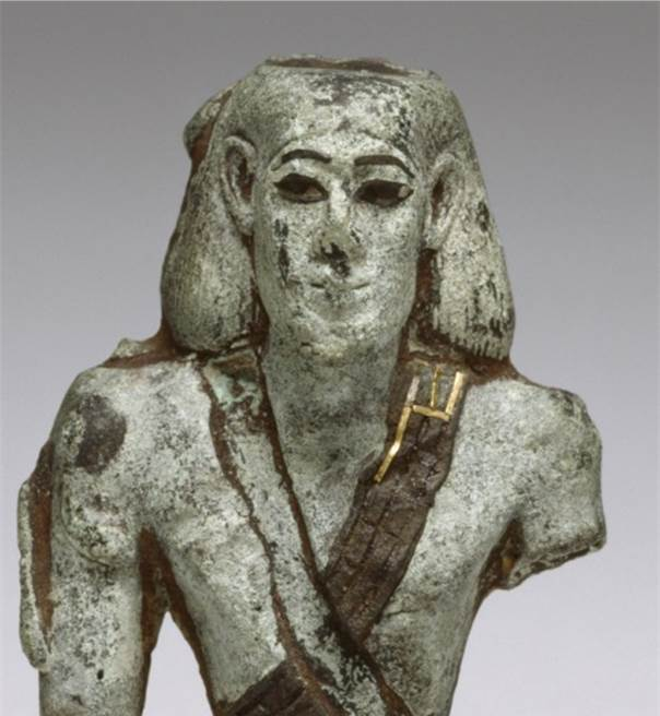 Soldato Libu egizio, Immagine originale: Egyptian - Libyan Appliqué - Walters 542151 (2).jpg